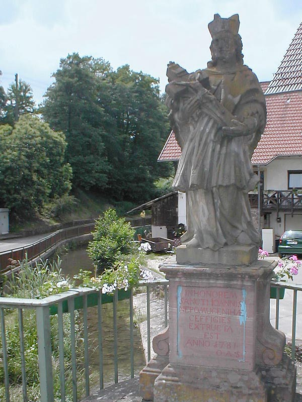 Brückenheiliger Nepomuk von 1781 in Waldwimmersbach